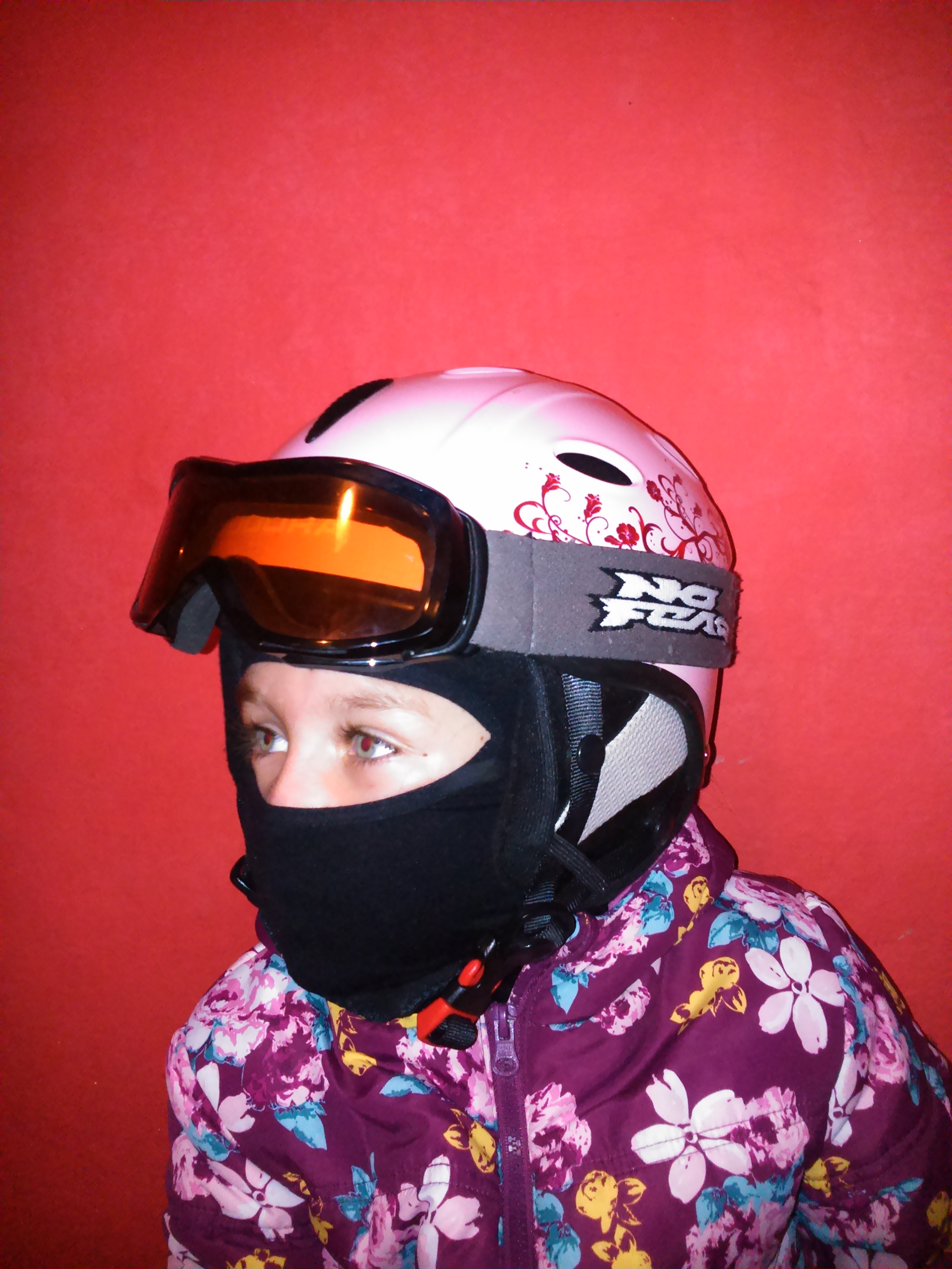 Opis: Smučarska podkapa, Avtor: Klavdija Štus, Podčetrtek, Slovenija.